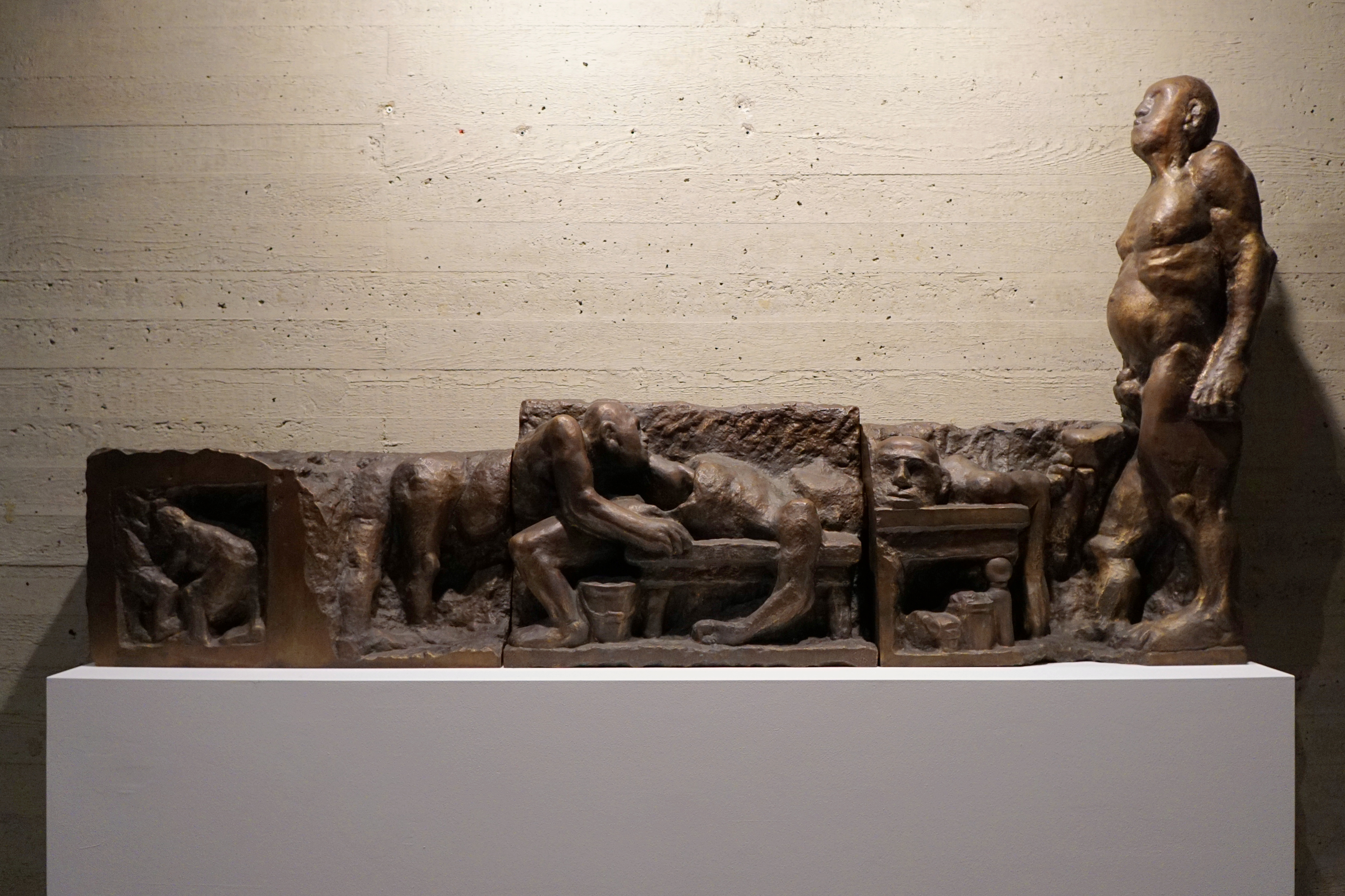 Der Haarmann-Fries des Bildhauers Alfred Hrdlicka im Sprengel Museum in Hannover. Das Foto wurde ohne Blitz und ohne Stativ aufgenommen und entspricht somit den Vorgaben aus den Besucherinformationen des Museums.